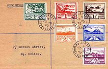 Série de timbres-postes réalisés en 1943 par Edmond Blampied pour la poste de Jersey sous occupation allemande.